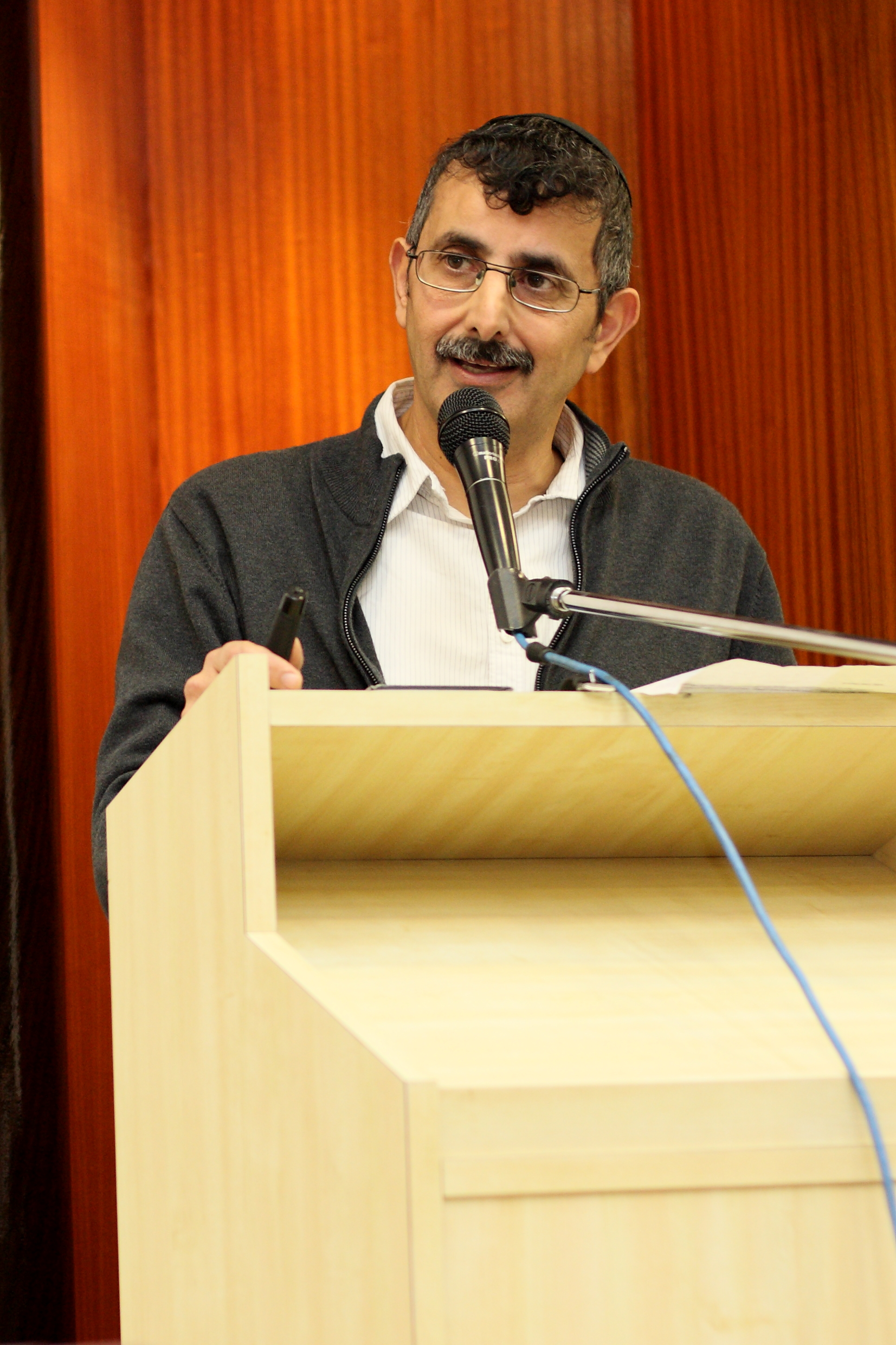 פרופ' זֹהר עמר בעת הרצאה בישיבת הר-ברכה על הארגמן והתכלת, אור לד' באדר א' תשע"ד